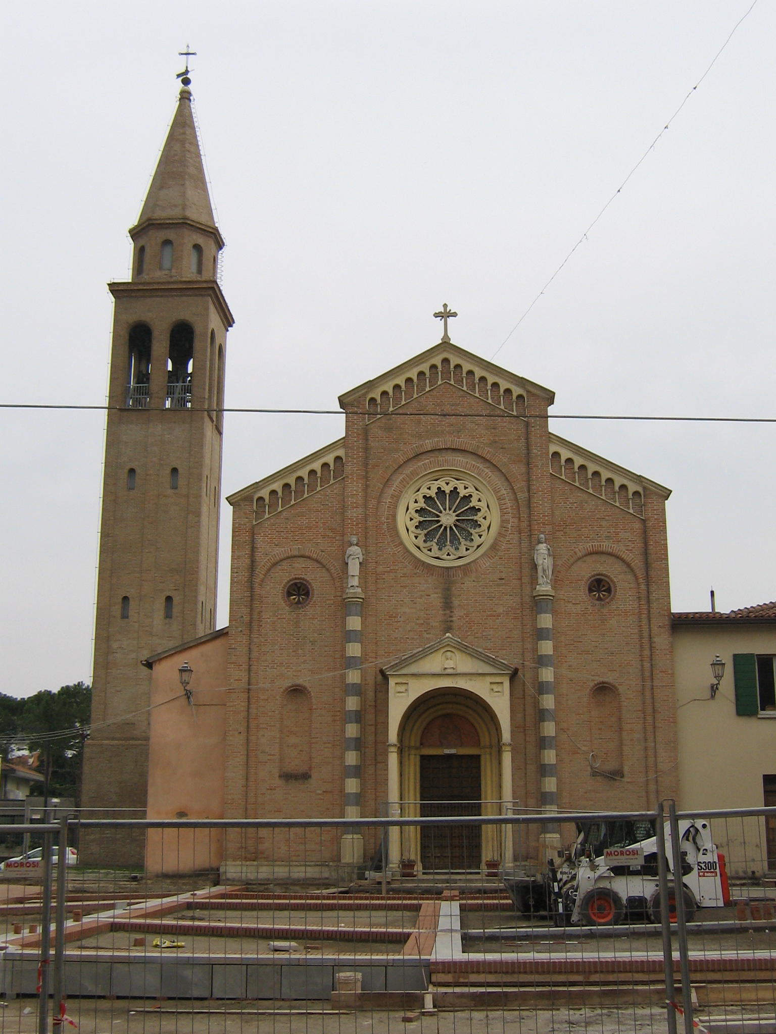 Chiesa di San Lorenzo, Gatteo (FC), Italy